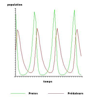 évolution des populations Cyclic solution to simple predator-prey equation